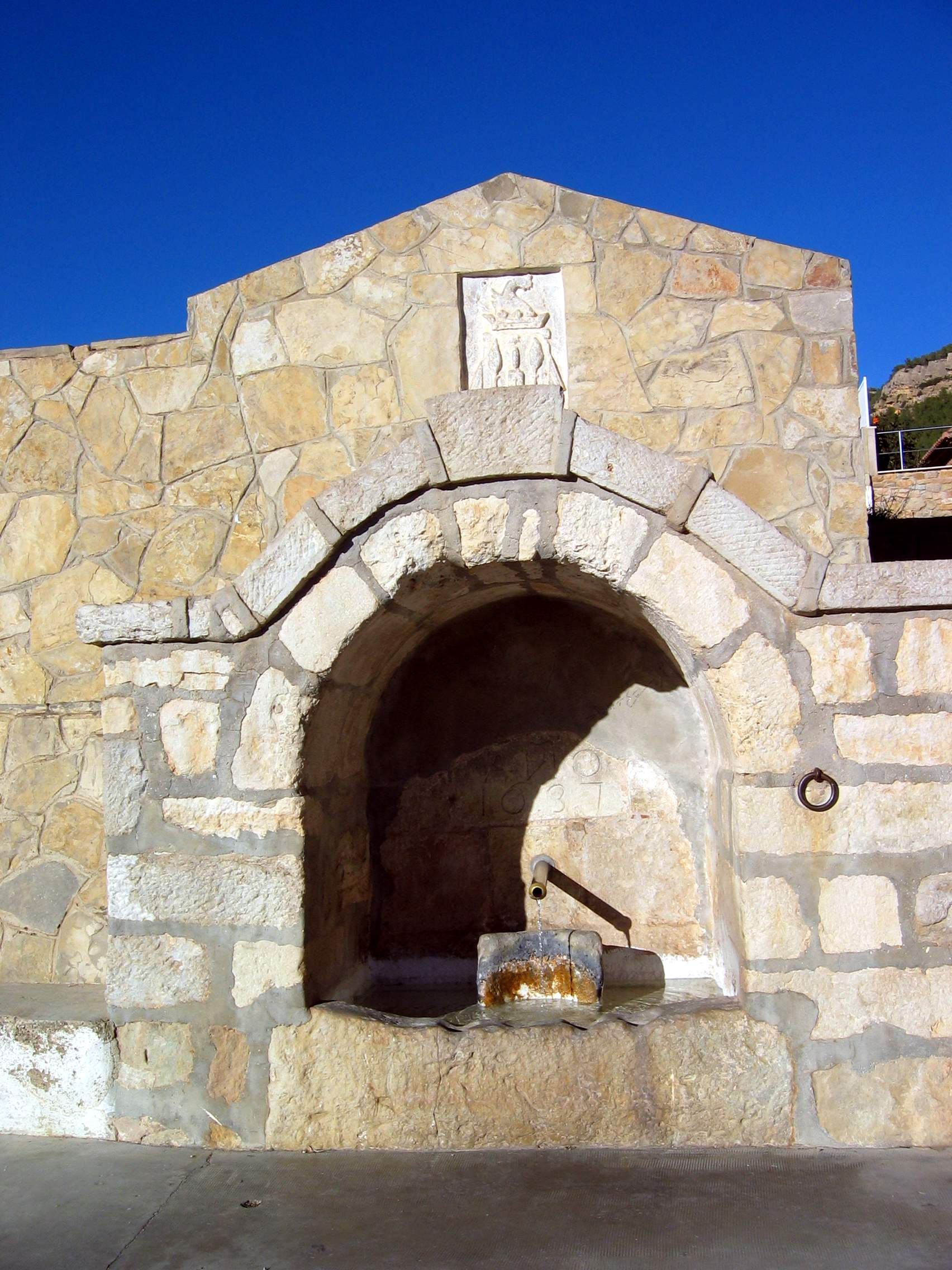 Detalle de fuente con abrevadero en Titaguas (Valencia), año 1637. Siglo XVII.